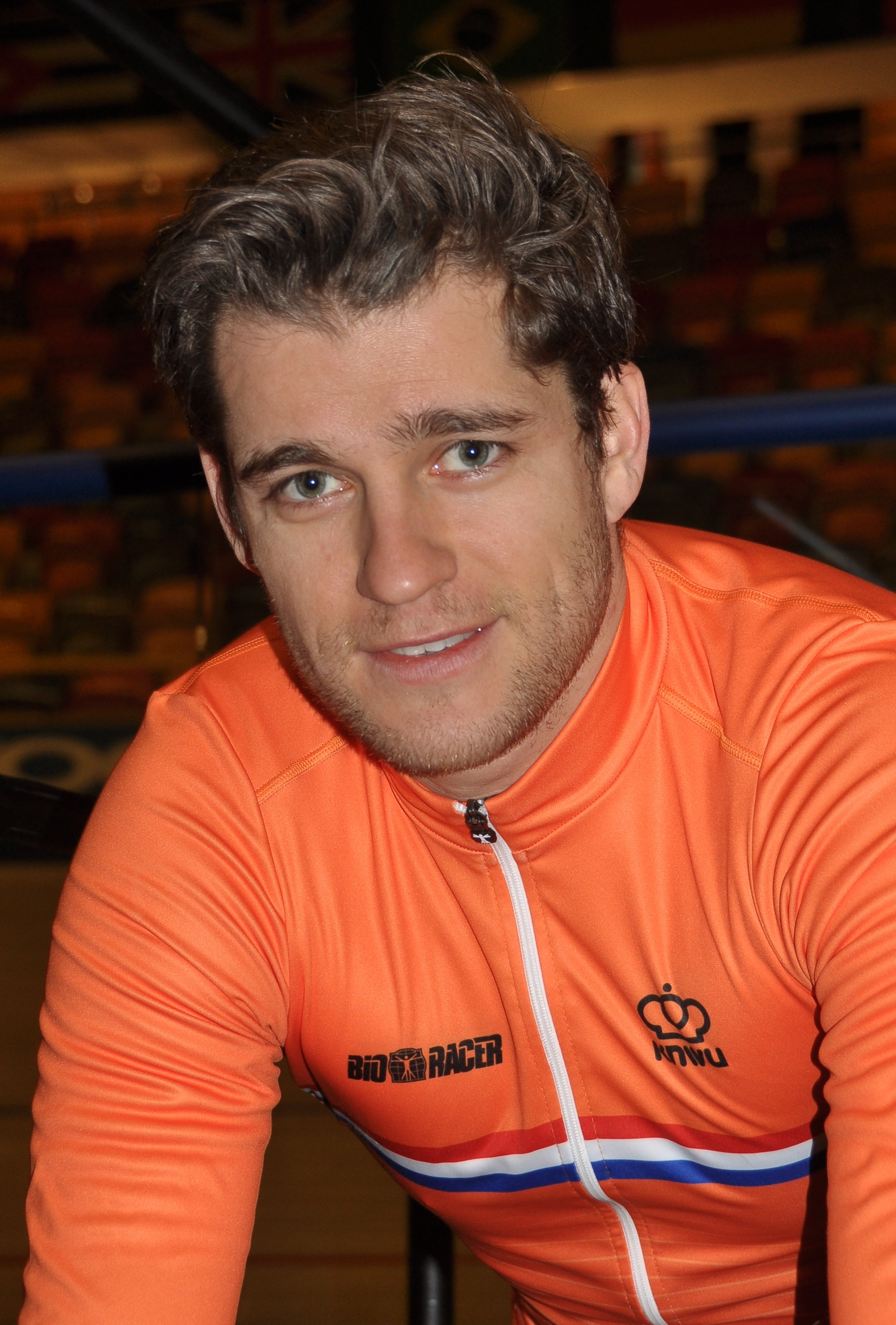 Theo Bos, niederländischer Radsportler